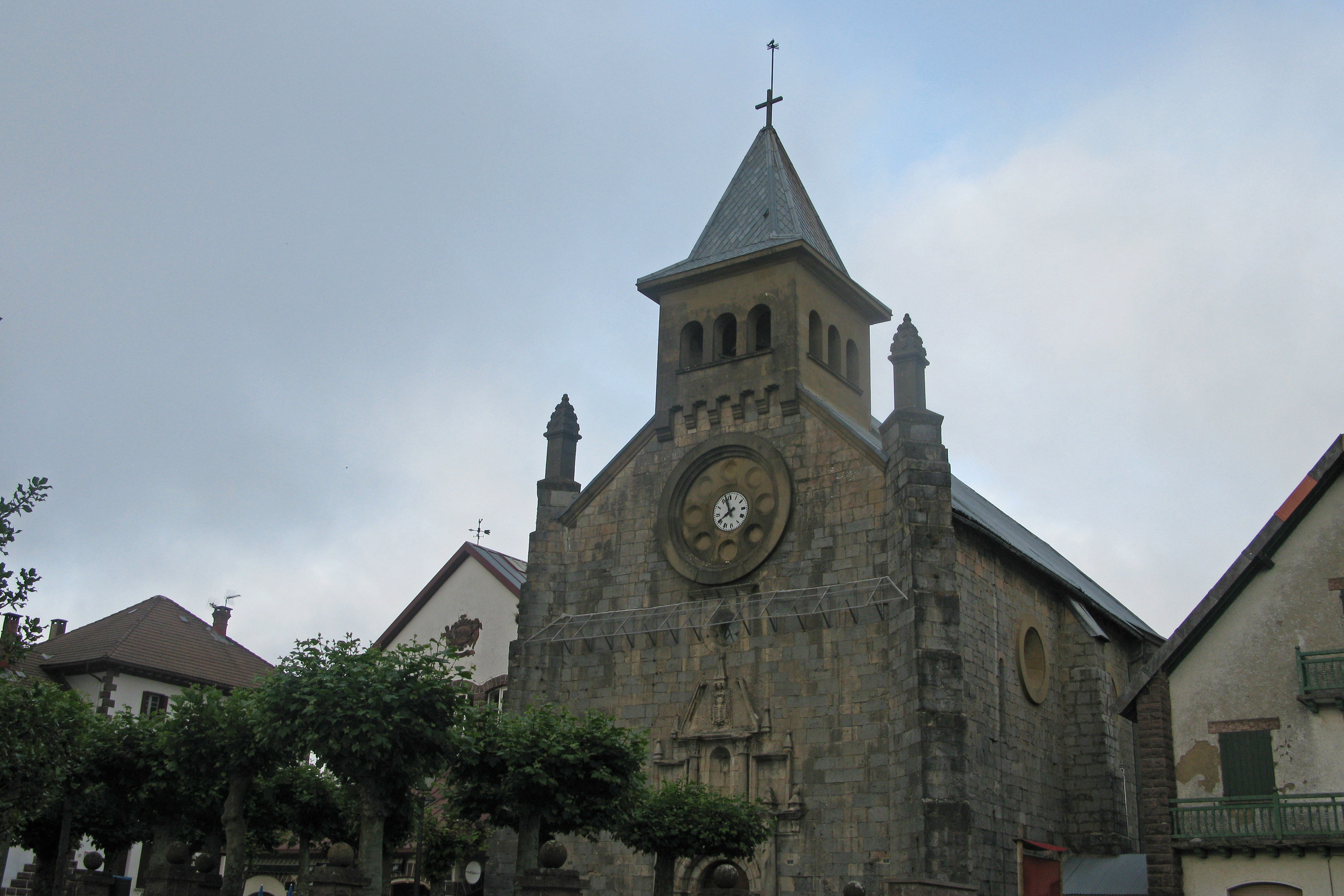 Auritz-Burguette 3